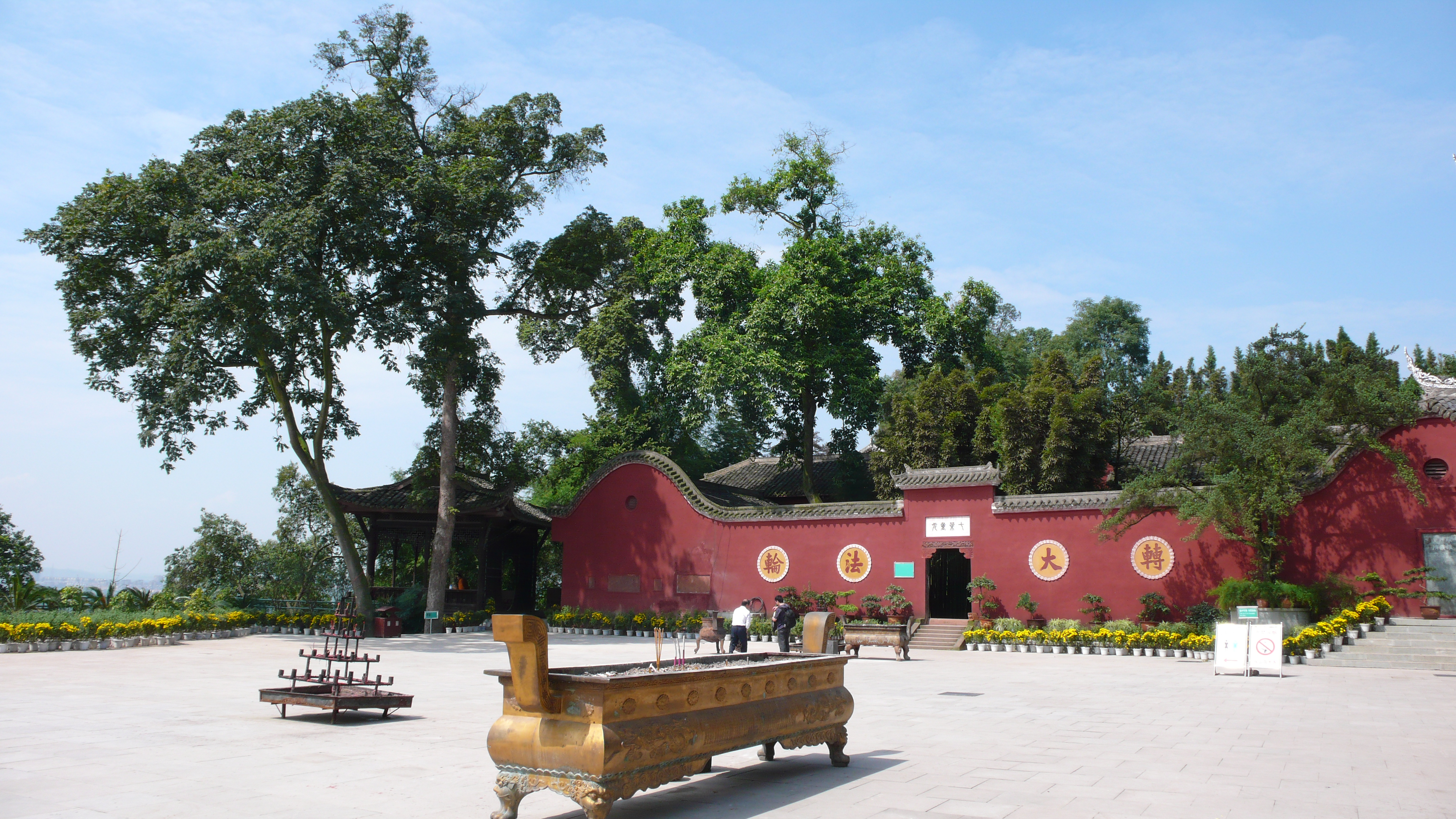 中文（台灣）: 烏尤寺內景